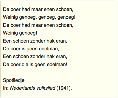 Tekst volksliedje 'De boer had maar enen schoen' (oudste vindplaats: ca. 1860). Opgenomen in het liedboek "Nederlands volkslied", samengesteld door Pollmann en Tiggers (1941).